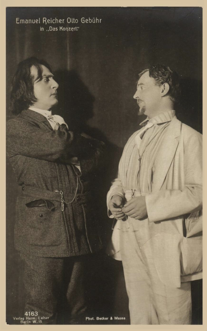 Emanuel Reicher und Otto Gebühr in Das Konzert. Photopostkarte des Ateliers (Otto) Becker & (Heinrich) Maass